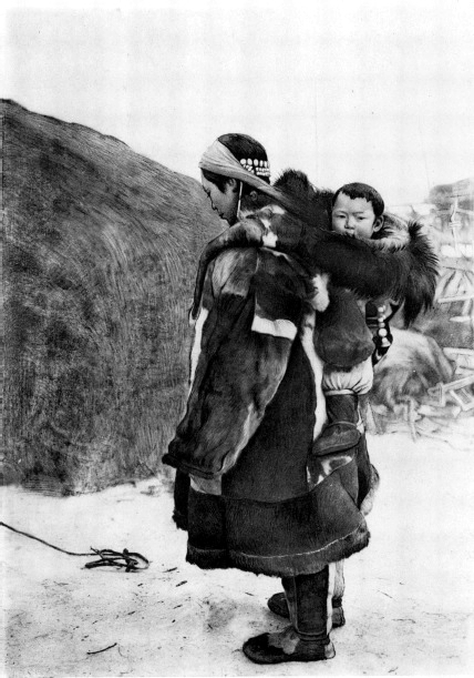 Korjakische Frau mit Kind um 1900.